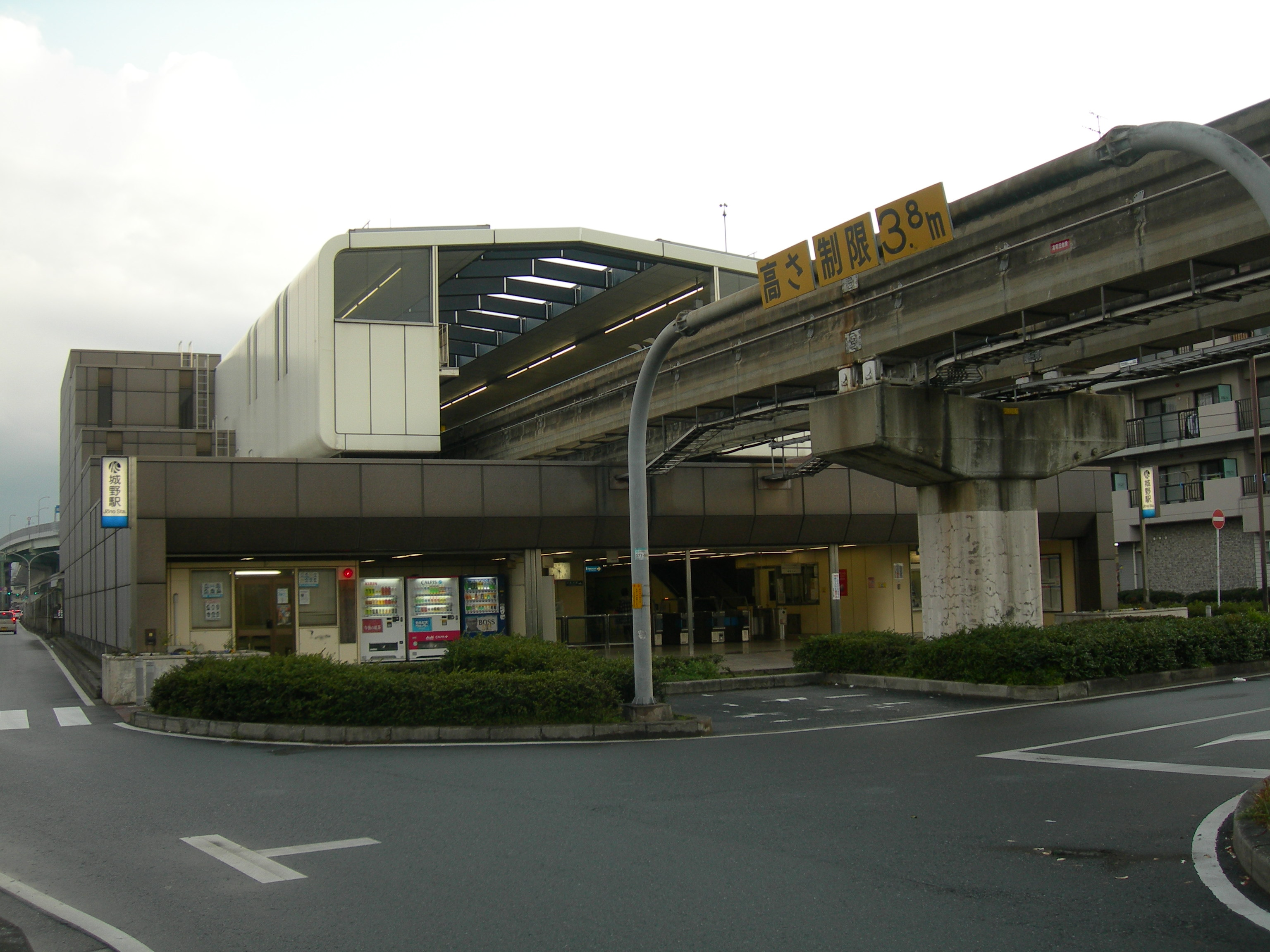 城野駅(北九州高速鉄道)